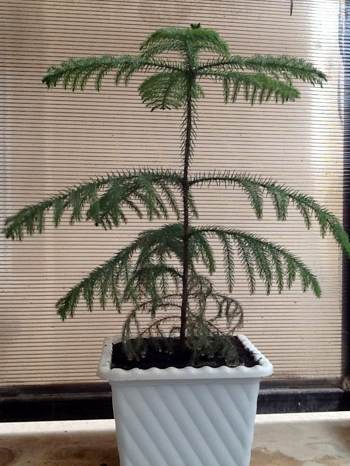 This is a Araucaria heterophylla, which is placed in balcony. The image is taken in Qom, in a hot summer afternoon.